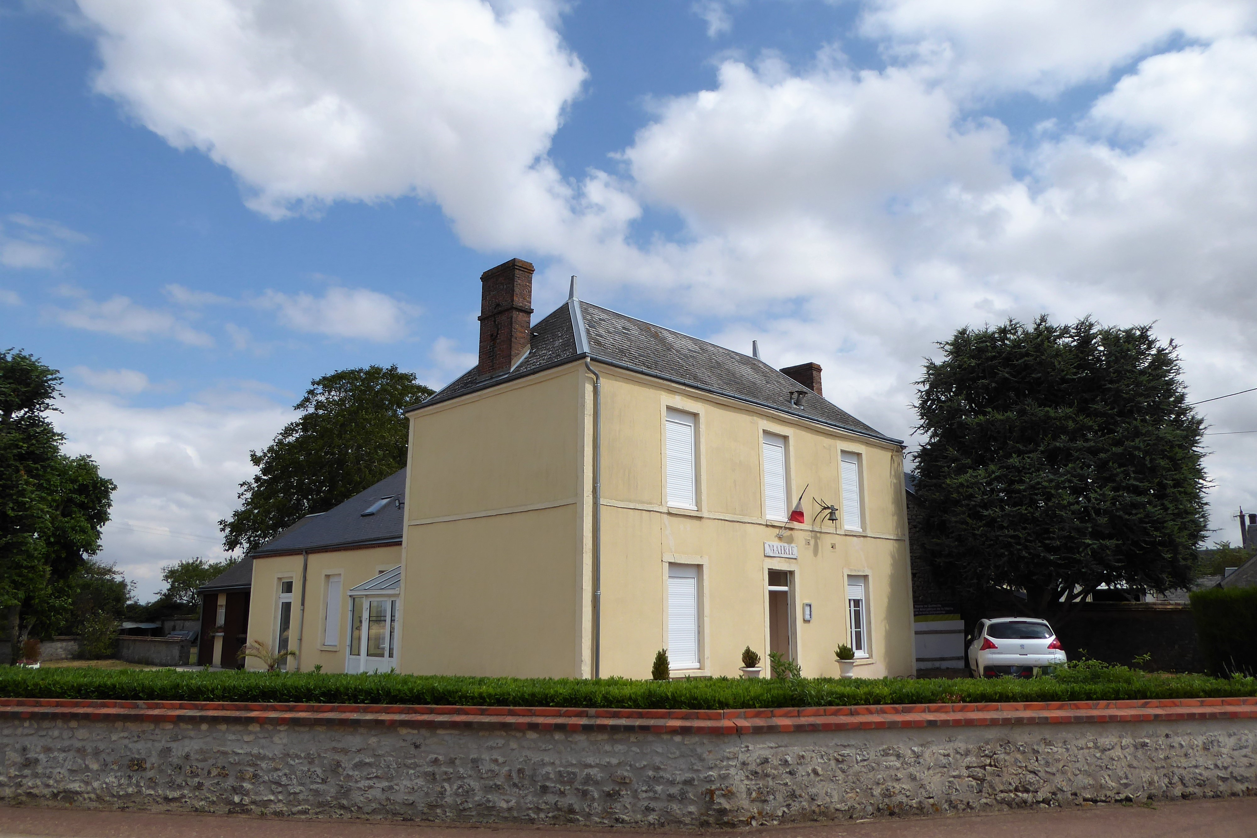 mairie de Guilleville, Eure-et-Loir, France.